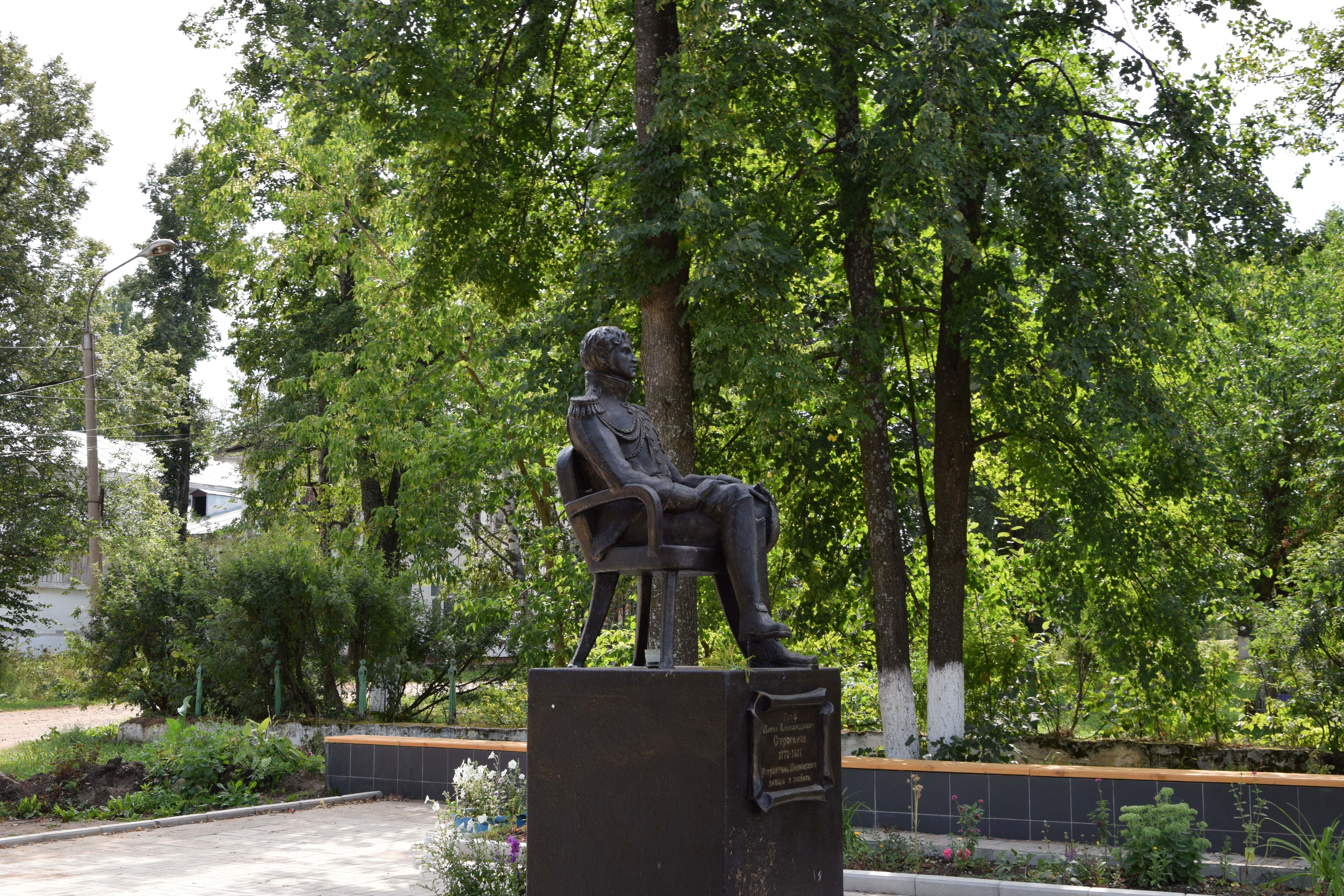 Памятник Павлу Строганову в пгт. Павловский. Открыт 23 июля 2016 года в честь празднования 200-летия посёлка.